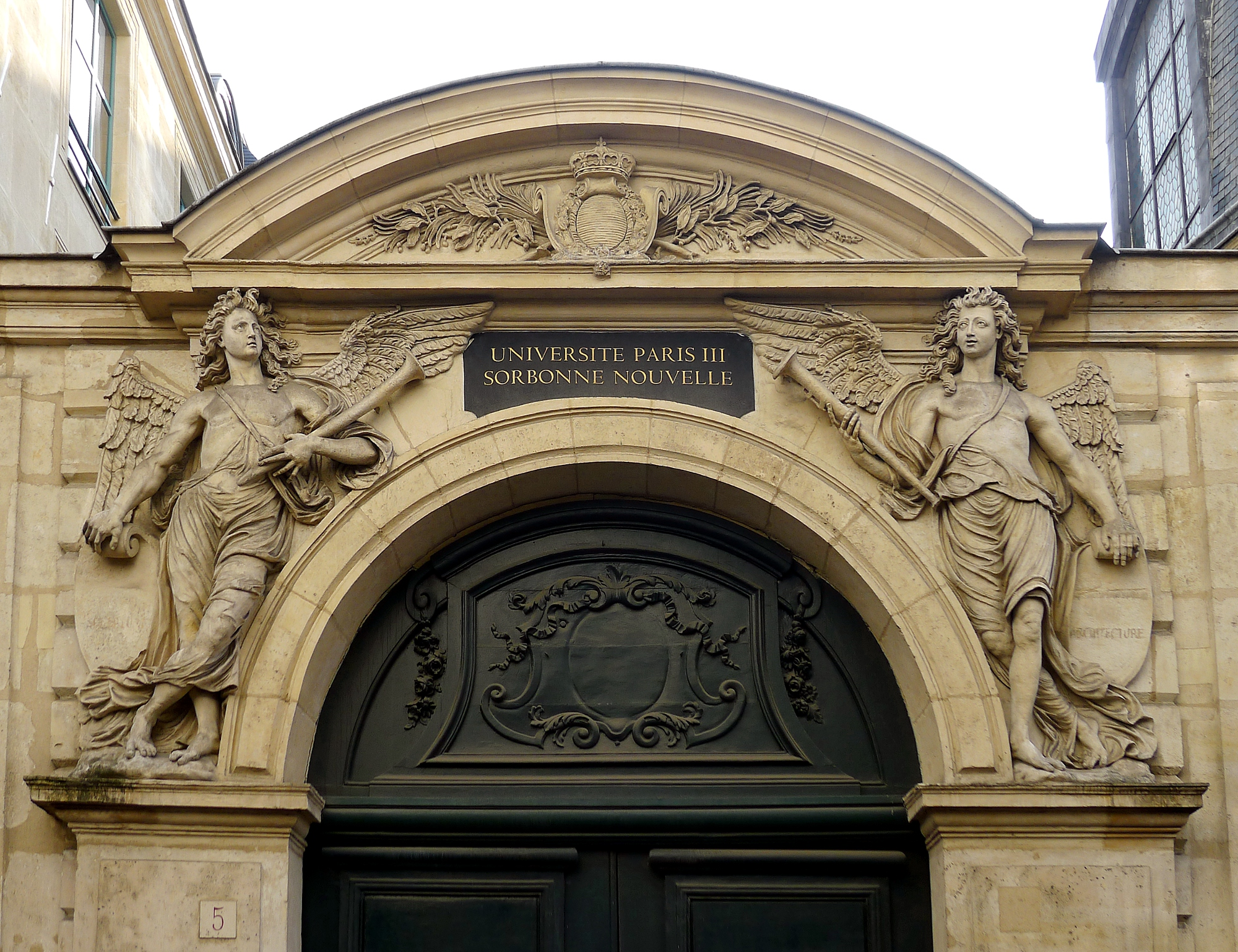 Rue de l'École-de-Médecine (n°5 : ancienne académie royale de chirurgie ; détail du portail d'entrée ) - Paris VI .